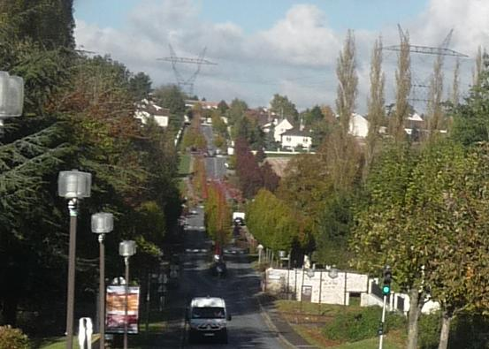 vue depuis Egly, au niveau du RER